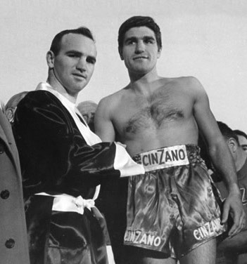 Don Fullmer and Nino Benvenuti in San Remo